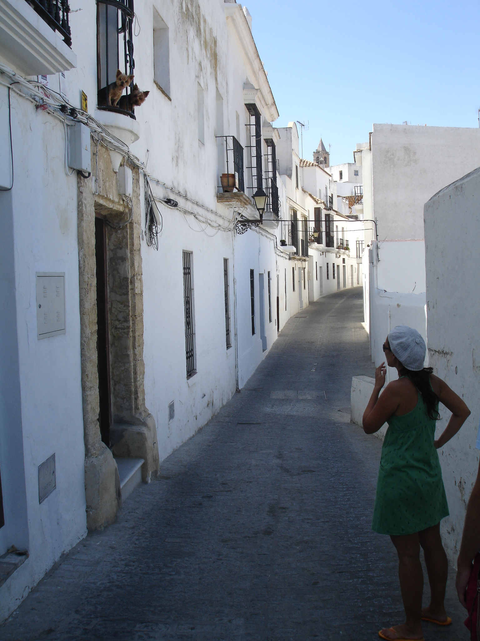 Vejer de la Frontera, Andalusia (SPAIN)